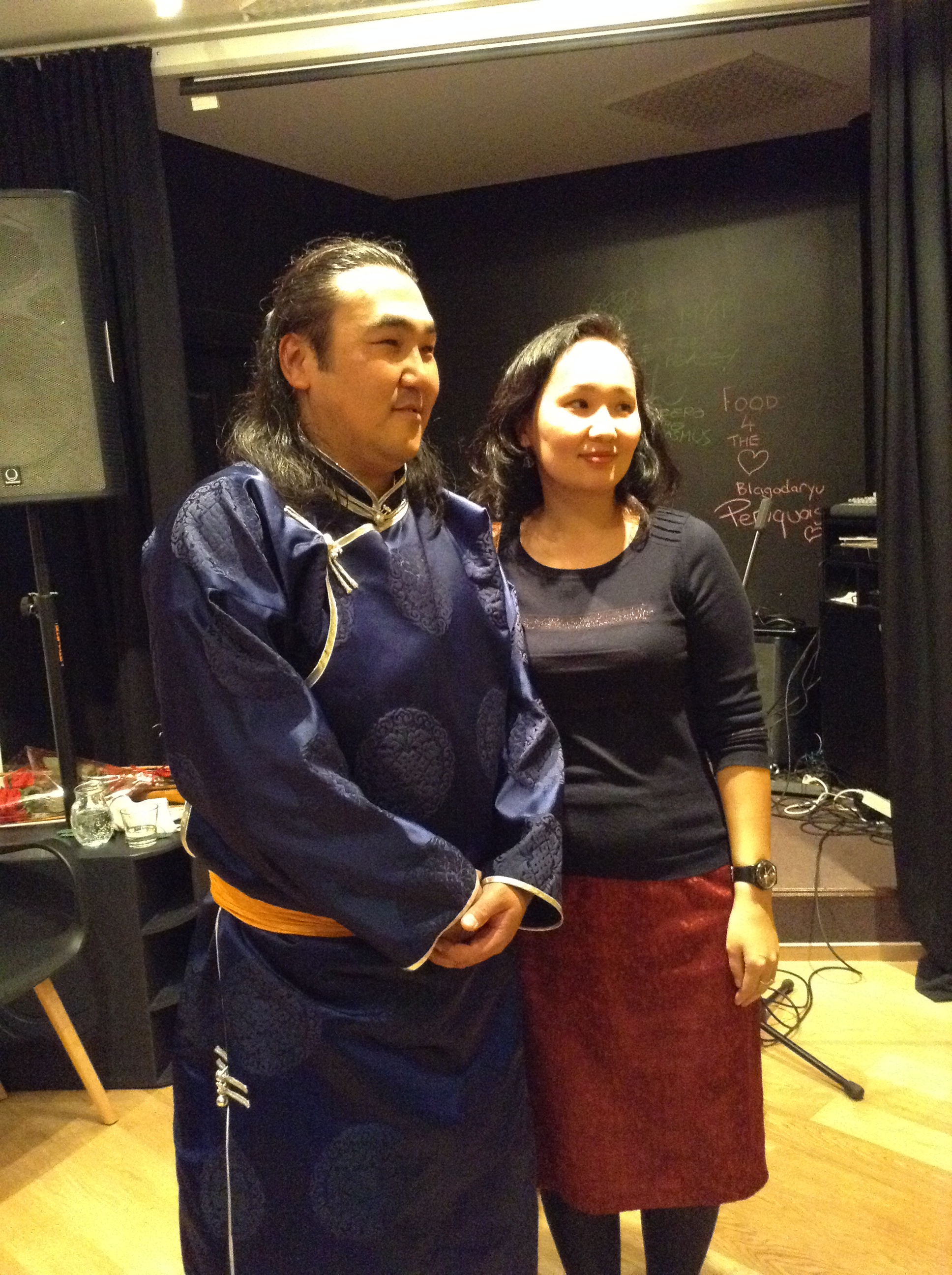 Тыва дыл: Радик Түлүш Новосибирск хоорайга концерт берген соонда Азияна Байыр-оол-биле.